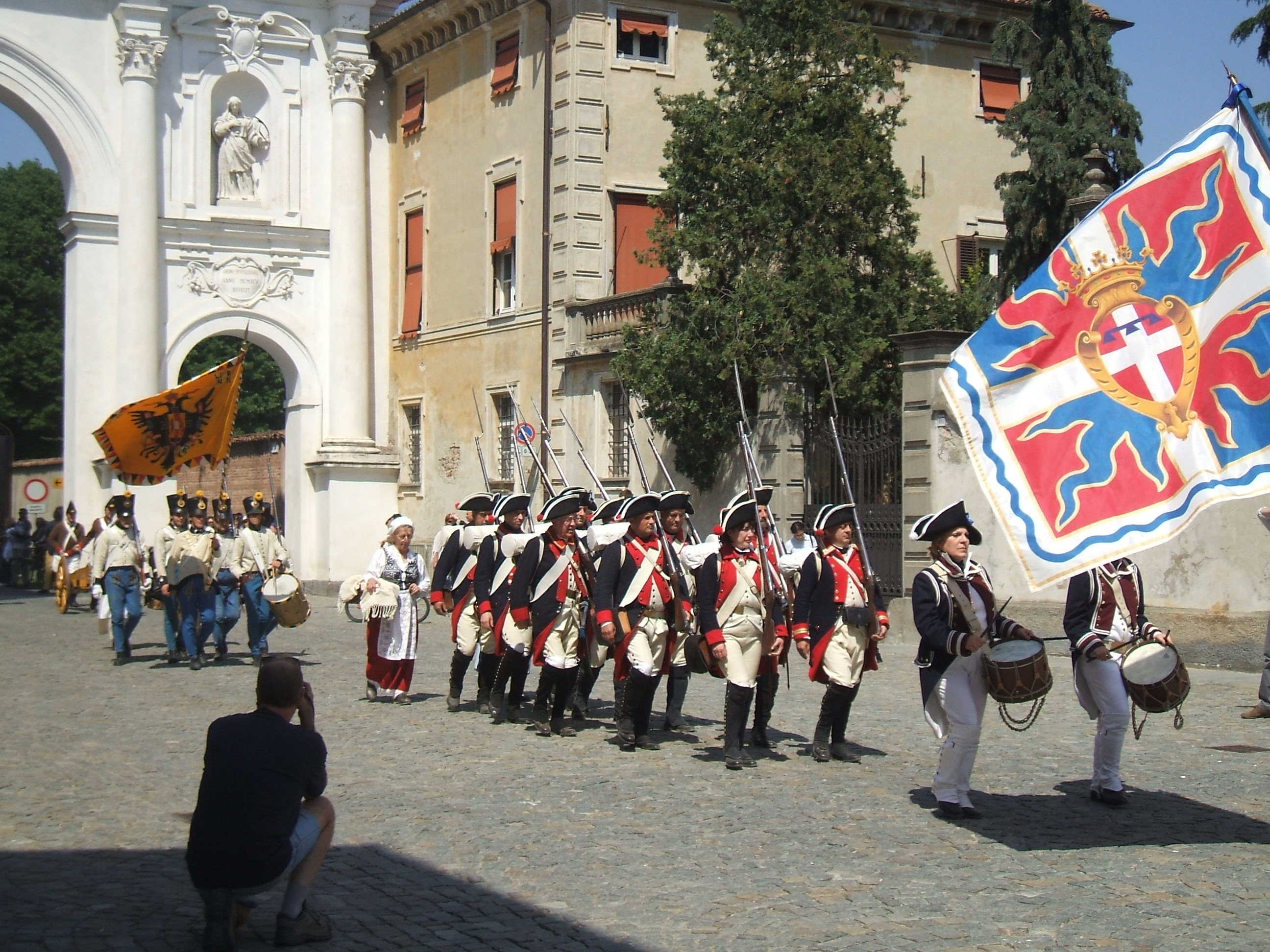 Cherasco, manifestazioni per il 211° anniversario della firma della Pace di Cherasco; particolare dell'esercito piemontese